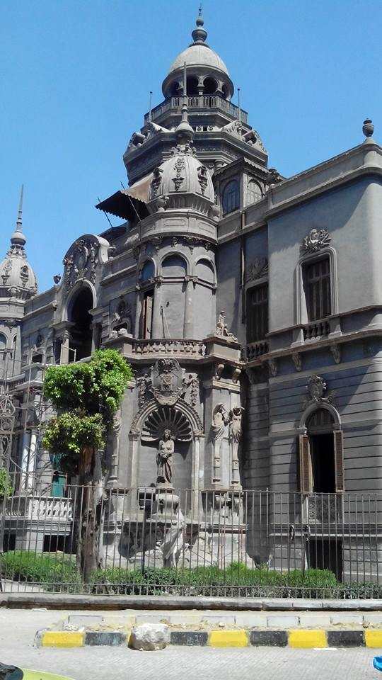 قصر السكاكيني من أقدم قصور مصروقد تم بناؤه سنة 1897 م على يد حبيب باشا السكاكيني يقع القصر في ميدان السكاكيني في وسط مدينة القاهرة، وتحديدا في منطقة الظاهر المزدحمة بالسكان وعرف محيط القصر لاحقا بحي السكاكيني. بني قصر السكاكيني على يد معماريين إيطاليين جاؤوا خصيصا للمشاركة في بناءه، وتتداخل فيه الطرازات المختلفة من حول العالم، ويعتبر نموذج لفن الروكوكو، [1] يكاد يختفي القصر اليوم وسط غابة من الابنية المتهالكة التي لا تملك أي حس جمالي وربما تمر بميدان السكاكيني دون أن تلحظ وجوده خاصة ليلا حيث يختفي القصر كليا في ظلام الميدان بالرغم من أنه مصنف ضمن آثار القاهرة بل وتتخذه منطقة آثار وسط القاهرة مقرا إداري لهم ! ومع ذلك يعاني القصر من الإهمال الشديد سواء من خارجه أو داخله.